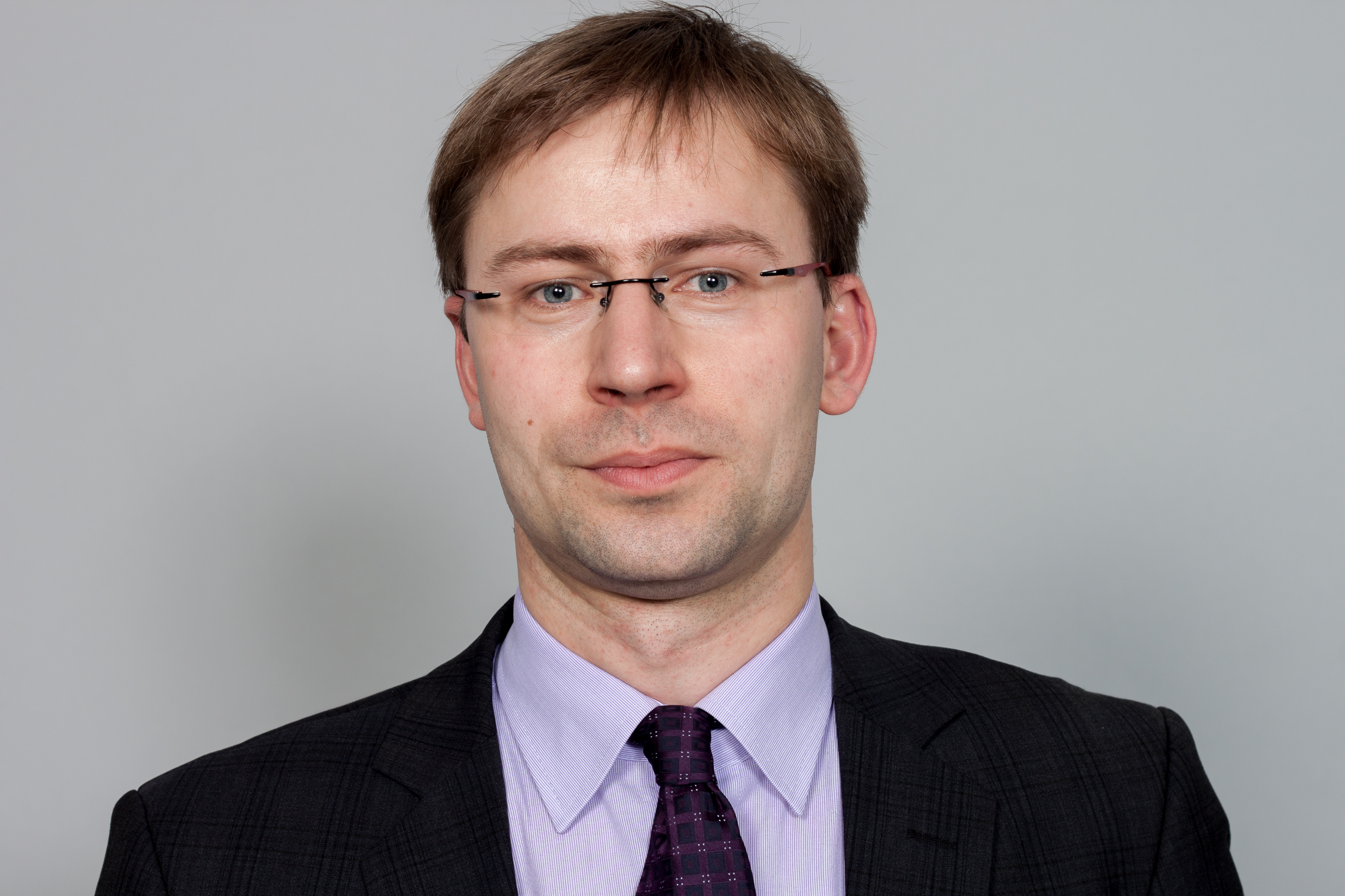 Abgeordneter des Sächsischen Landtages Holger Mann